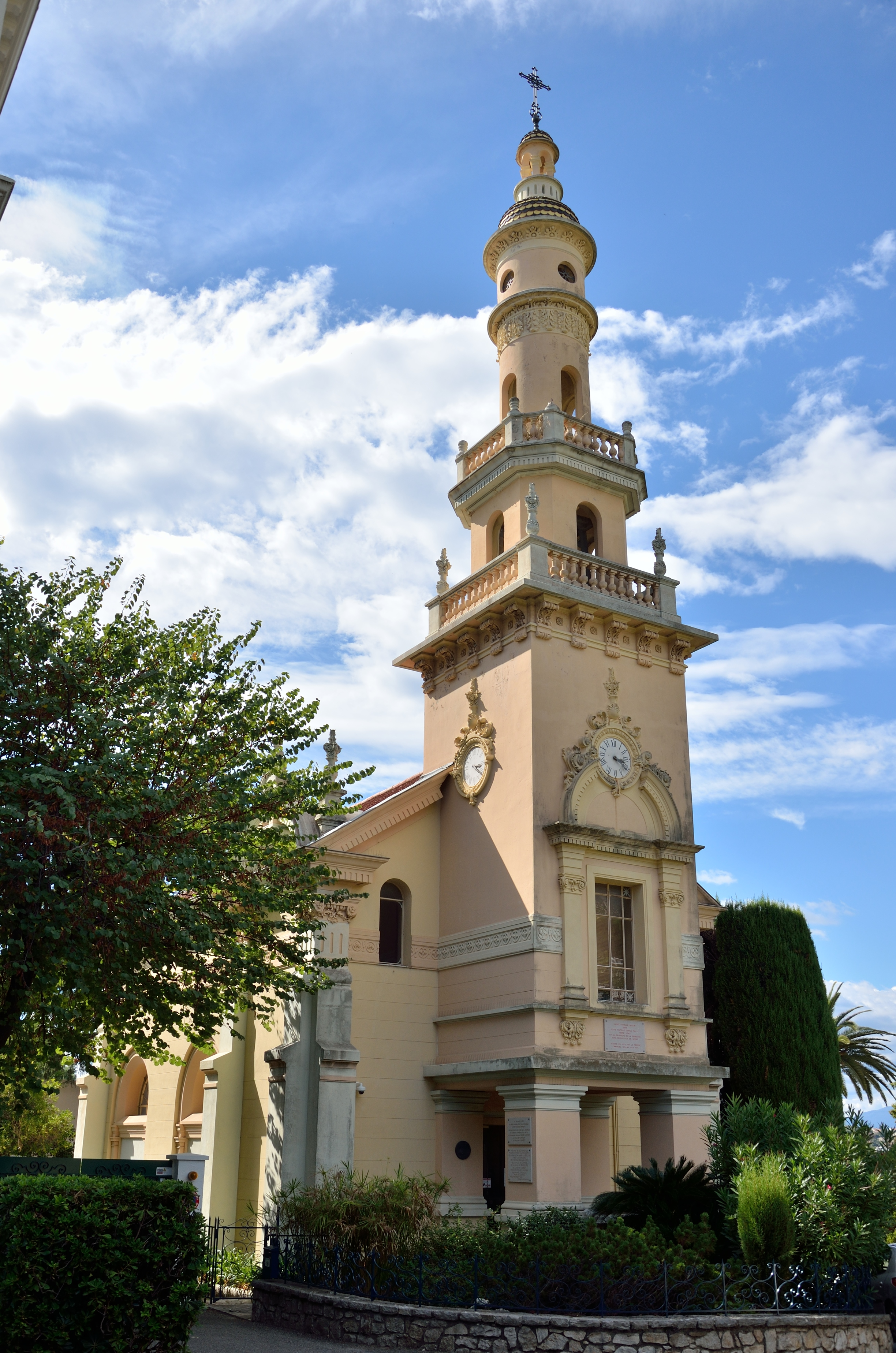 Chapelle Bellini, à Cannes, à l'intérieur du Parc Fiorentina.